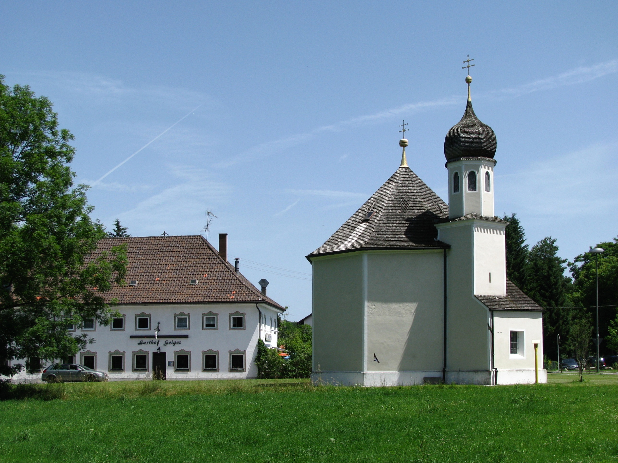 Nikolaus-Kapelle in Geretsried aus westlicher Richtung; dahinter der Gasthof Geiger.